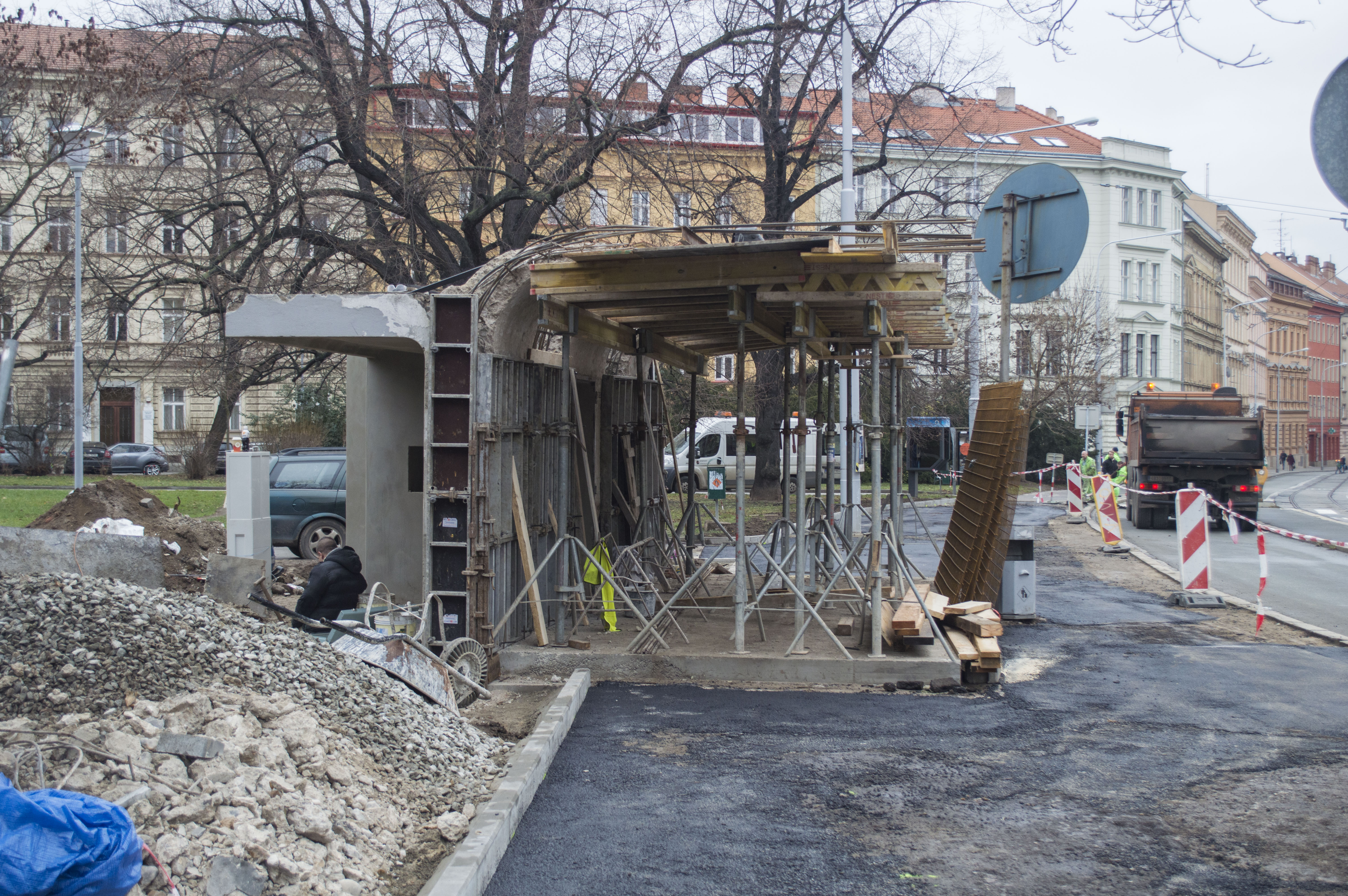 Funkcionalistická zastávka Oskara Pořísky během rekonstrukce.